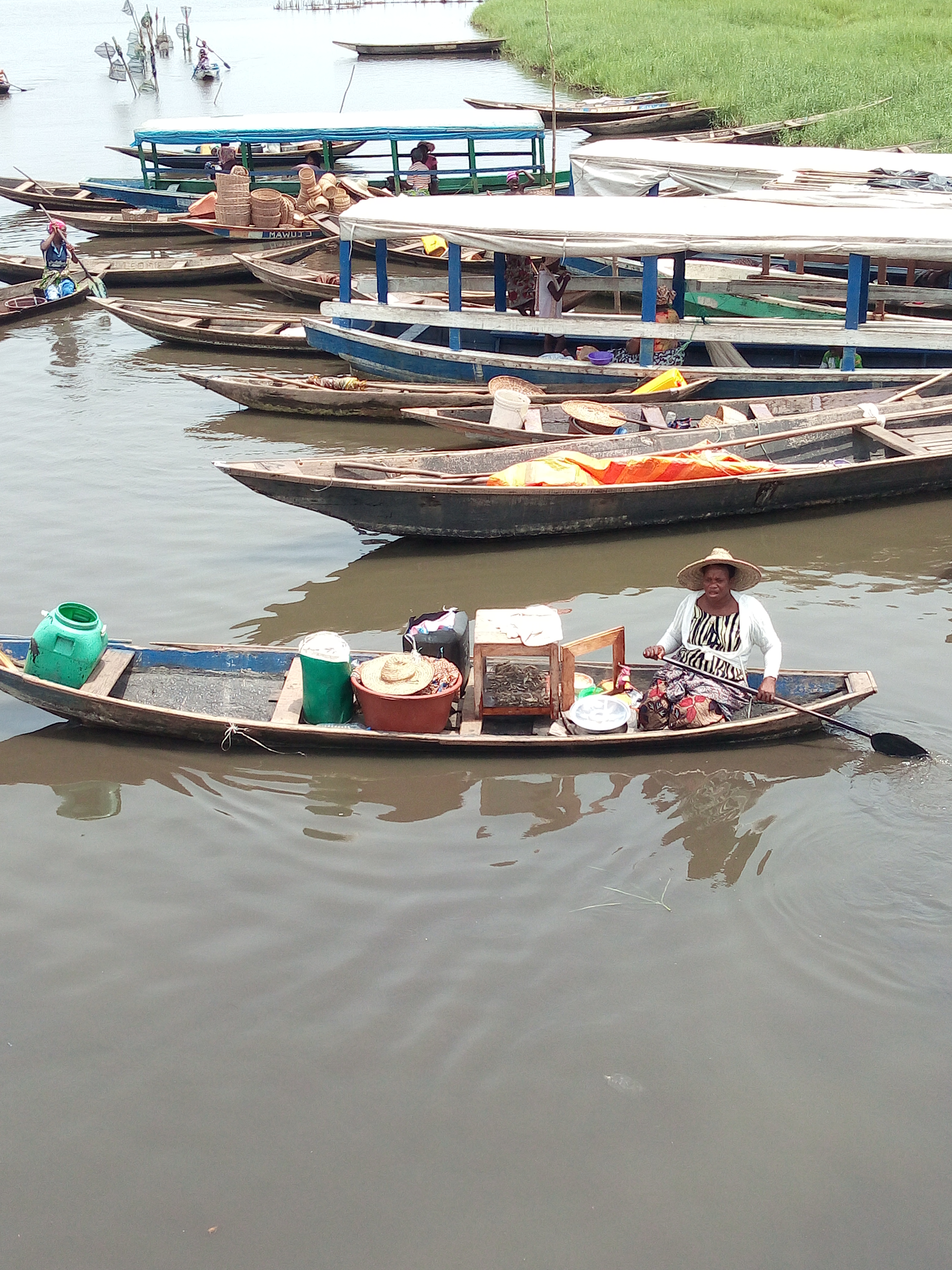 vente de poisson fumé et de fretin par une bonne dame sur le lac Nokoué This is an image with the theme "Africa on the Move or Transport" from: Benin